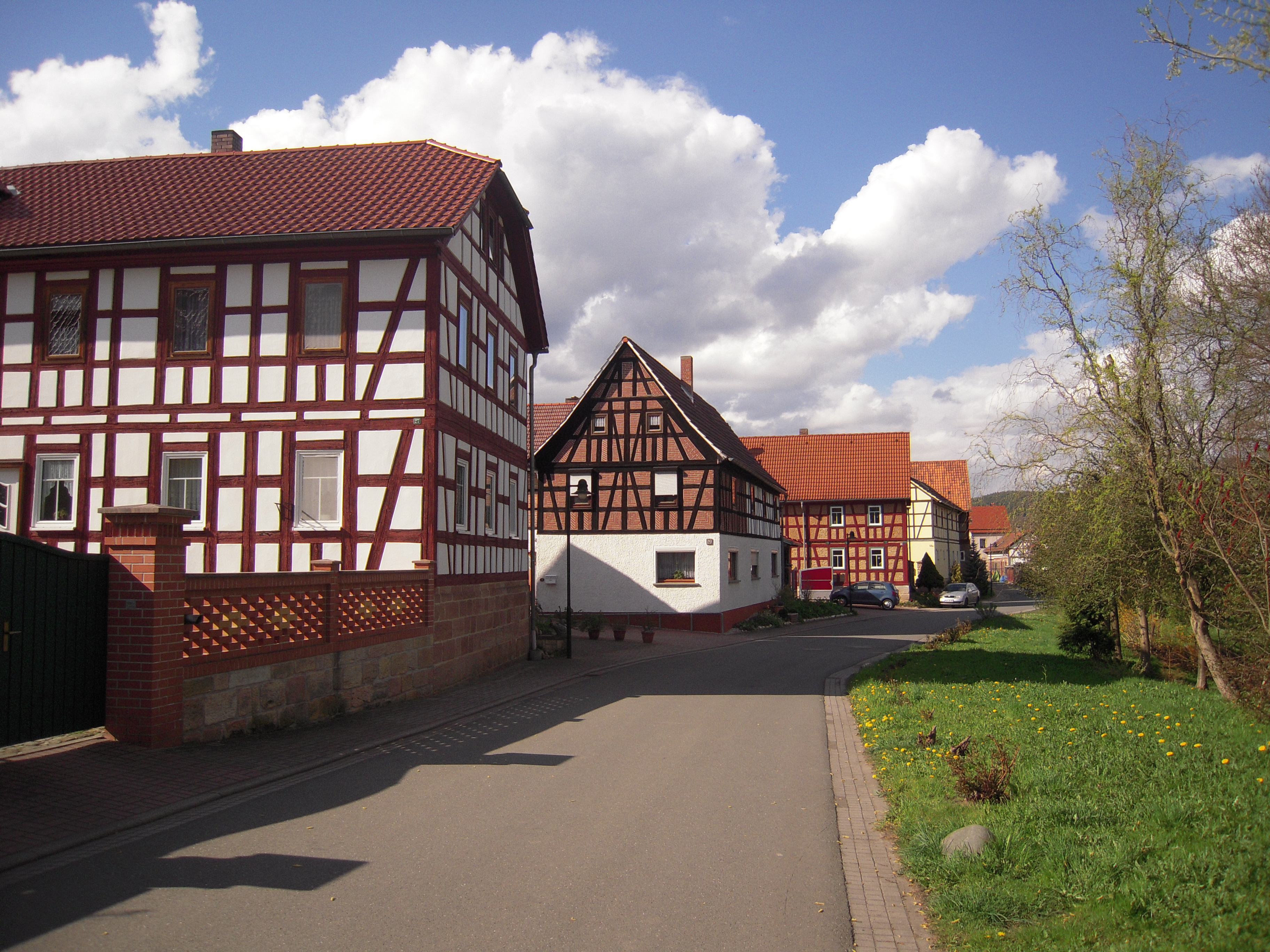 Blick ins Dorf Richtung Norden